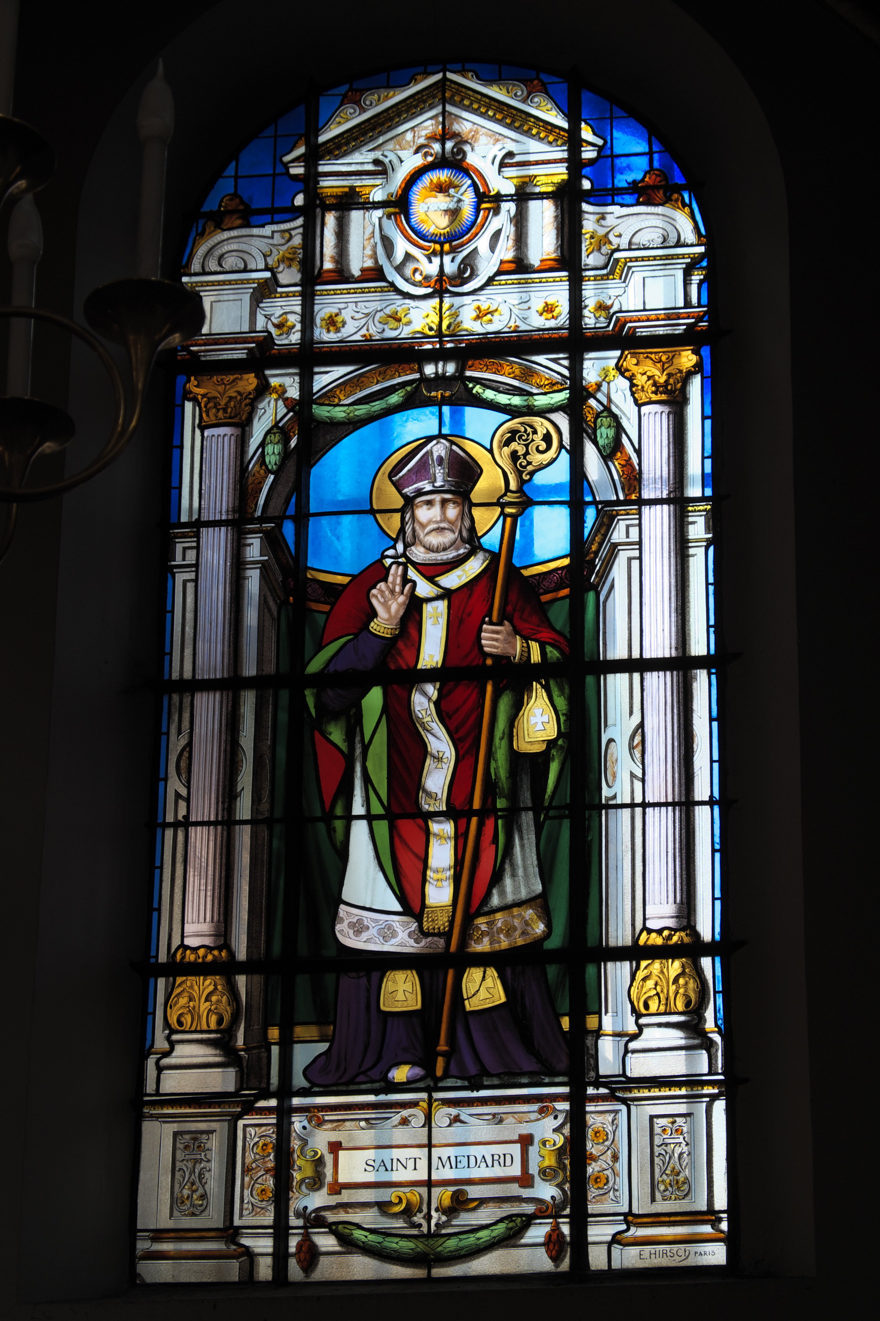 Bleiglasfenster in der katholischen Pfarrkirche Saint-Médard in Brunoy im Département Essonne (Île-de-France/Frankreich), zwischen 1885 und 1896 von Émile Hirsch ausgeführt; mit der Signatur: E. HIRSCH Paris; Darstellung: Heiliger Medardus